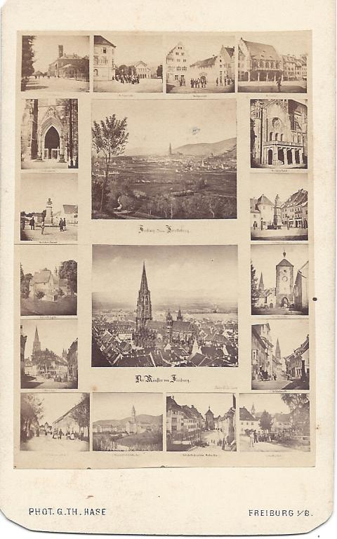 Freiburger Bilderbogen auf einer Carte de Visite von Gottlieb Theodor Hase um 1870.